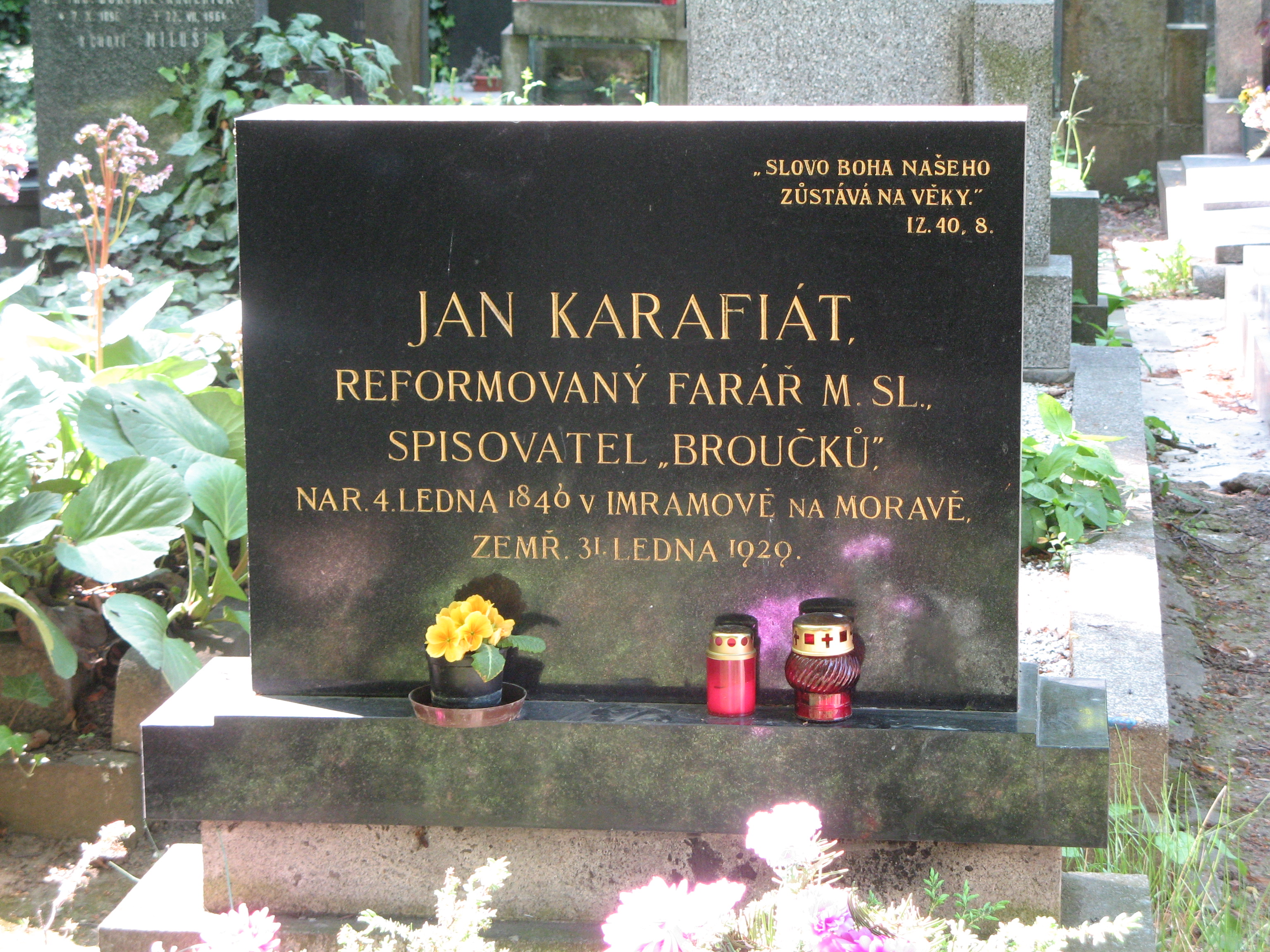 Jan Karafiát - náhrobek na Vinohradském hřbitově